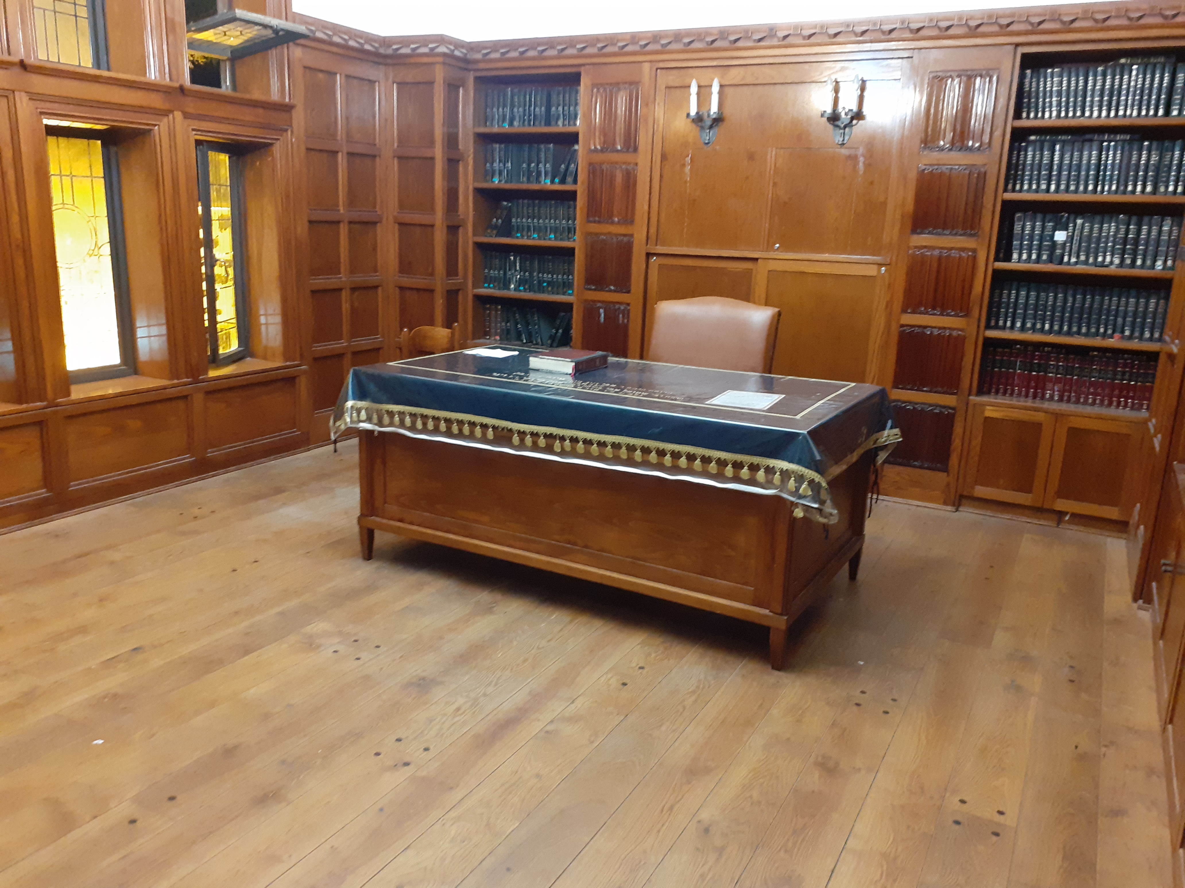 חדר הרבי במבנה 770 ברמת שלמה, העתק של החדר בניו יורק